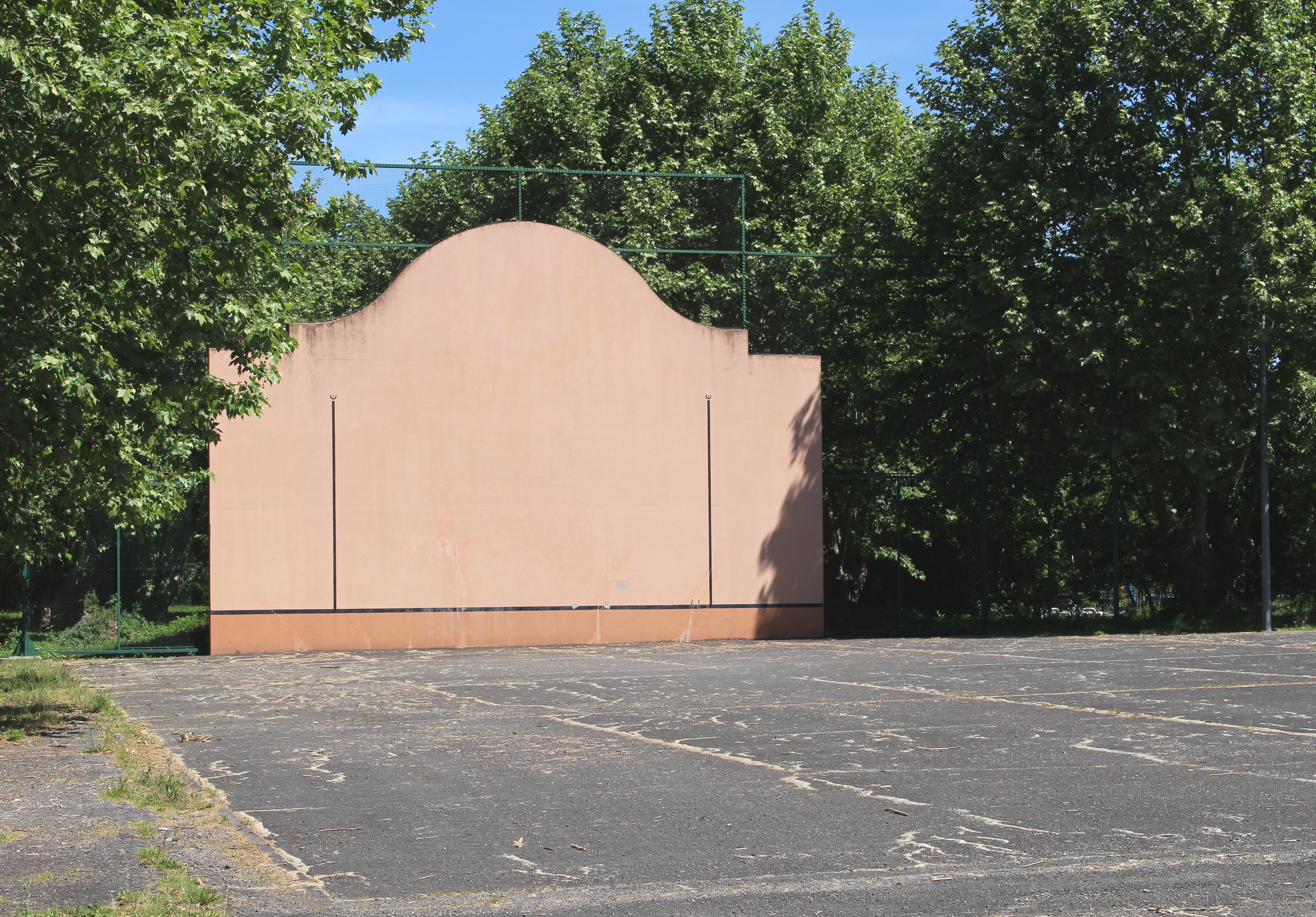 Fronton de Pujo (Hautes-Pyrénées)